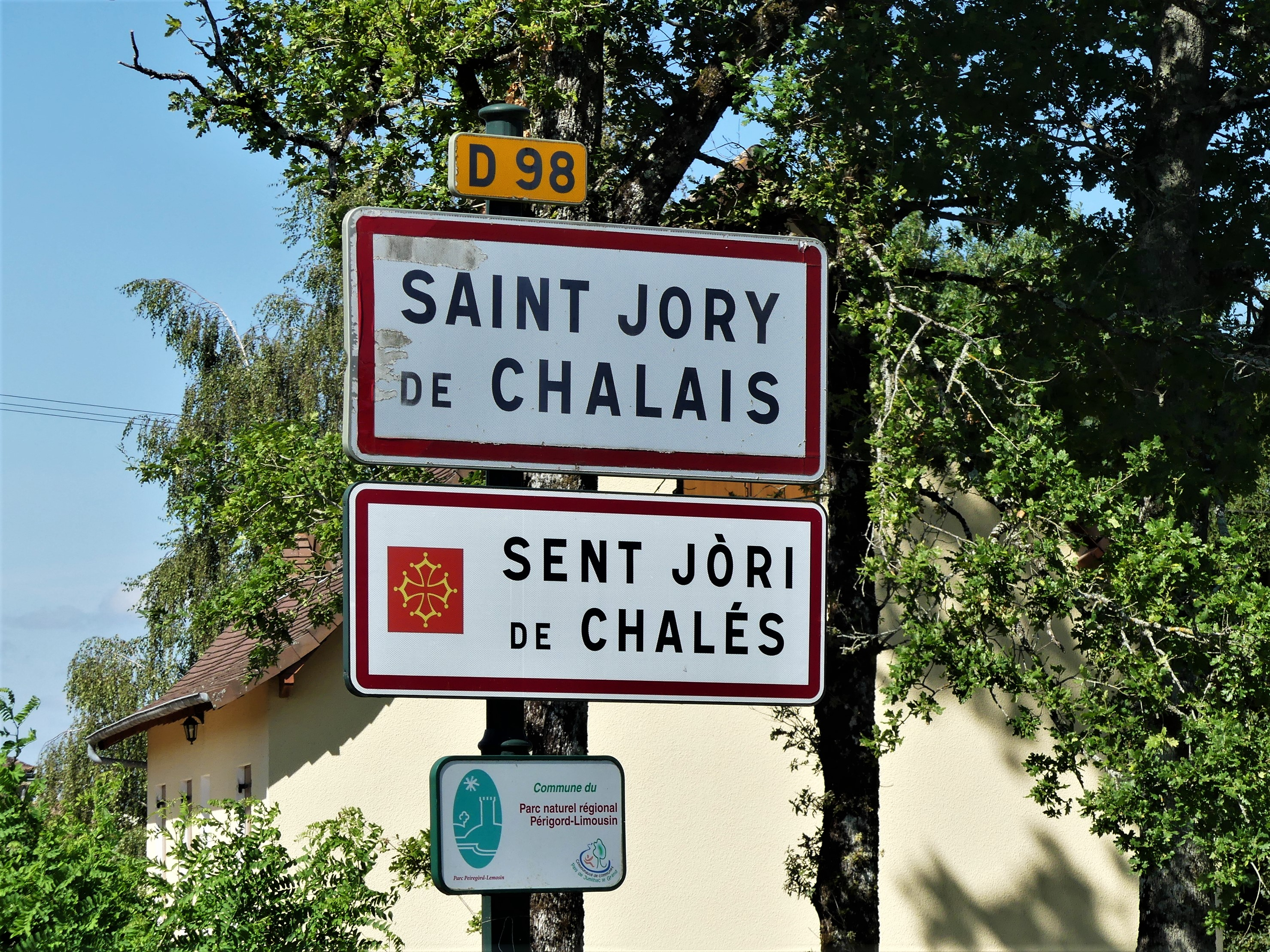 Panneau en français et occitan, Chalais, Dordogne, France.